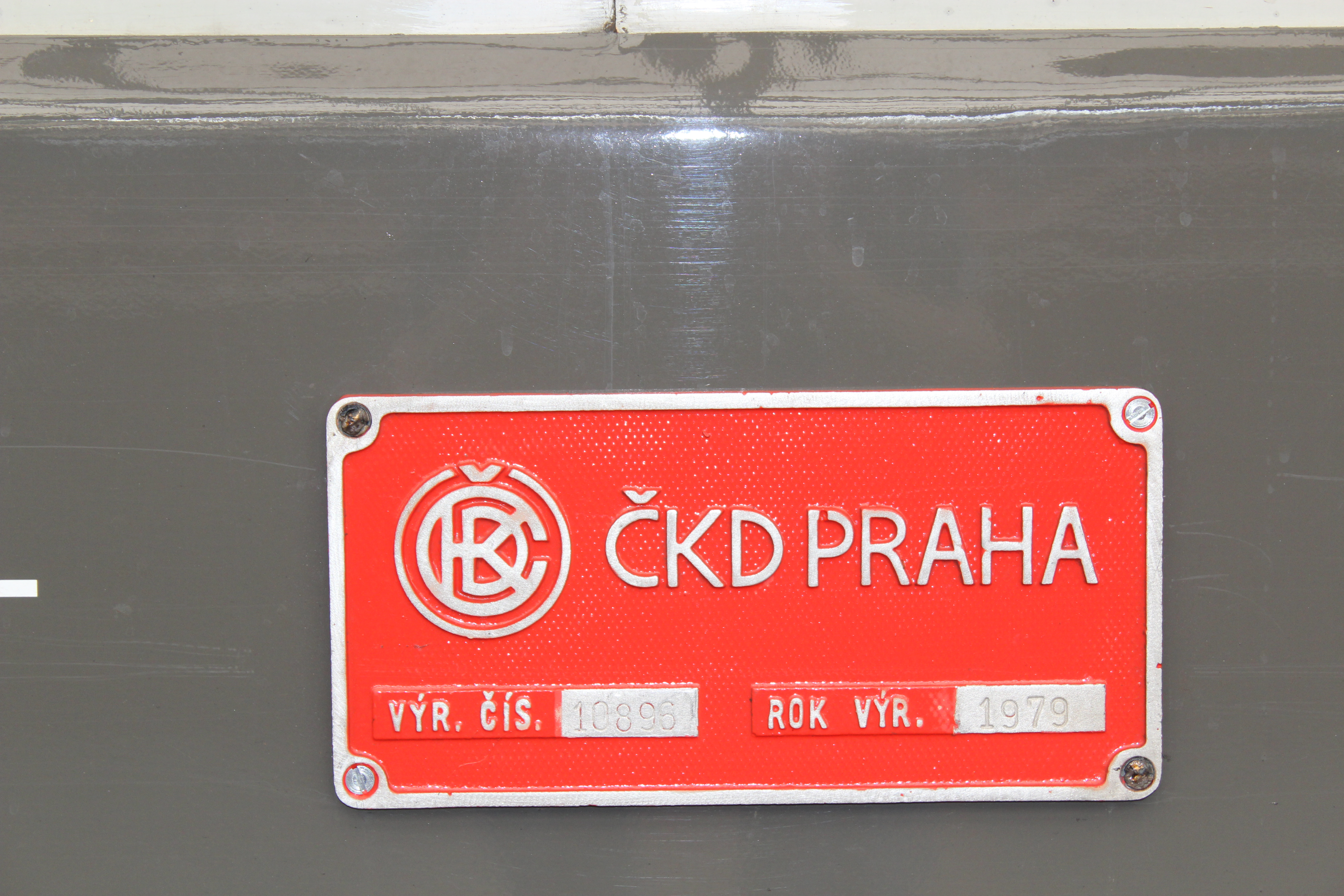 BREJLOVEC 754 042 - 0 Hlavní nádraží vlak Praha Čerčany 23. 8. 2014 8.23